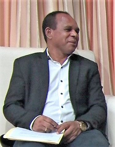 Tetun: S. Exa. Primeiru-Ministru Taur Matan Ruak Kinta-feira dader iha Palásiu Governu hala’o enkontru ho Sekretáriu Estadu Protesaun Xívil, Alexandrinho de Araújo hodi koalia kona-ba dezastre naturais ne’ebé akontese iha Munisípiu sira, liu-liu dezastre ne'ebé afeta iha Munisípiu Baucau, Lautem no Vikeke. Sekretáriu Estadu Protesaun Xívil, Alexandrinho de Araújo: Mai koalia ho S. Exa. Primeiru-Ministru koalia fokus liu kona-ba dezastre naturais ne'ebé afeta ba ita nian populasaun sira iha Munisípiu hotu, liu-liu Munisípiu 3 (Baucau, Lautem no Vikeke) ne'ebé afeta desde 26 Dezembru 2018 mai to agora i oinsa mak bele prepara mekanismu apoiu ida ba ita nia populasaun sira ne'ebé afeta ba dezastre naturais. Iha parte seluk fali S. Exa. Primeiru-Ministru fó ordem para segunda-Feira enkontru entre Protesaun Xívil ho Estatal, Sosial nomos Ministériu relevante balun atu nune'e bele kria Steering committee ida (Comitê diretivo) atu nune'e komitê ne'e bele lao hamutuk para halo verifikasaun ba dadus nomos oinsa bele fó apoiu ba ita nian povu sira ne'ebé afeta ba dezastre naturais.